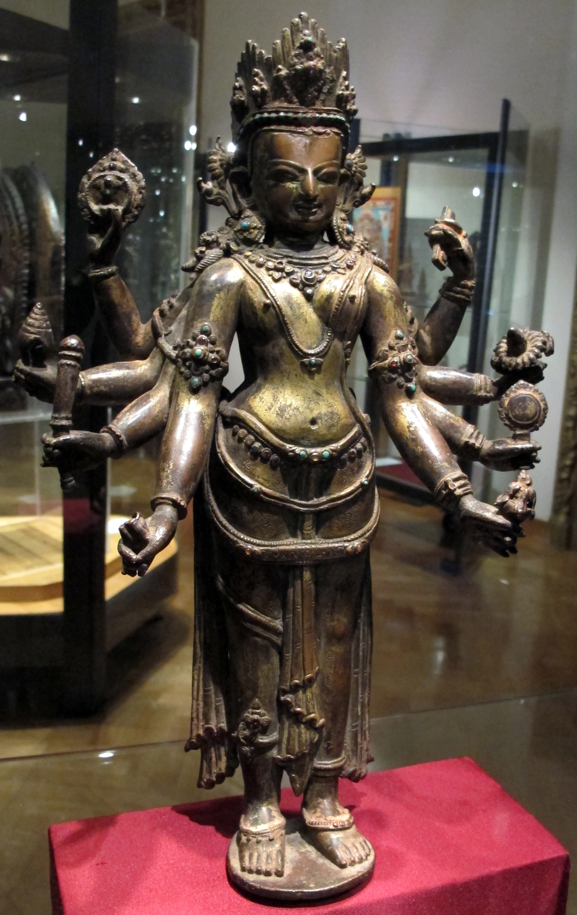 Nepal, lashminarayana, xvii-xviii sec.